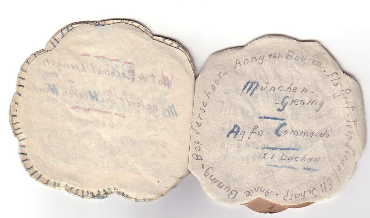 Souvenir van mevrouw van Ommen, lid van het Agfacommando van Dachau, pagina 3